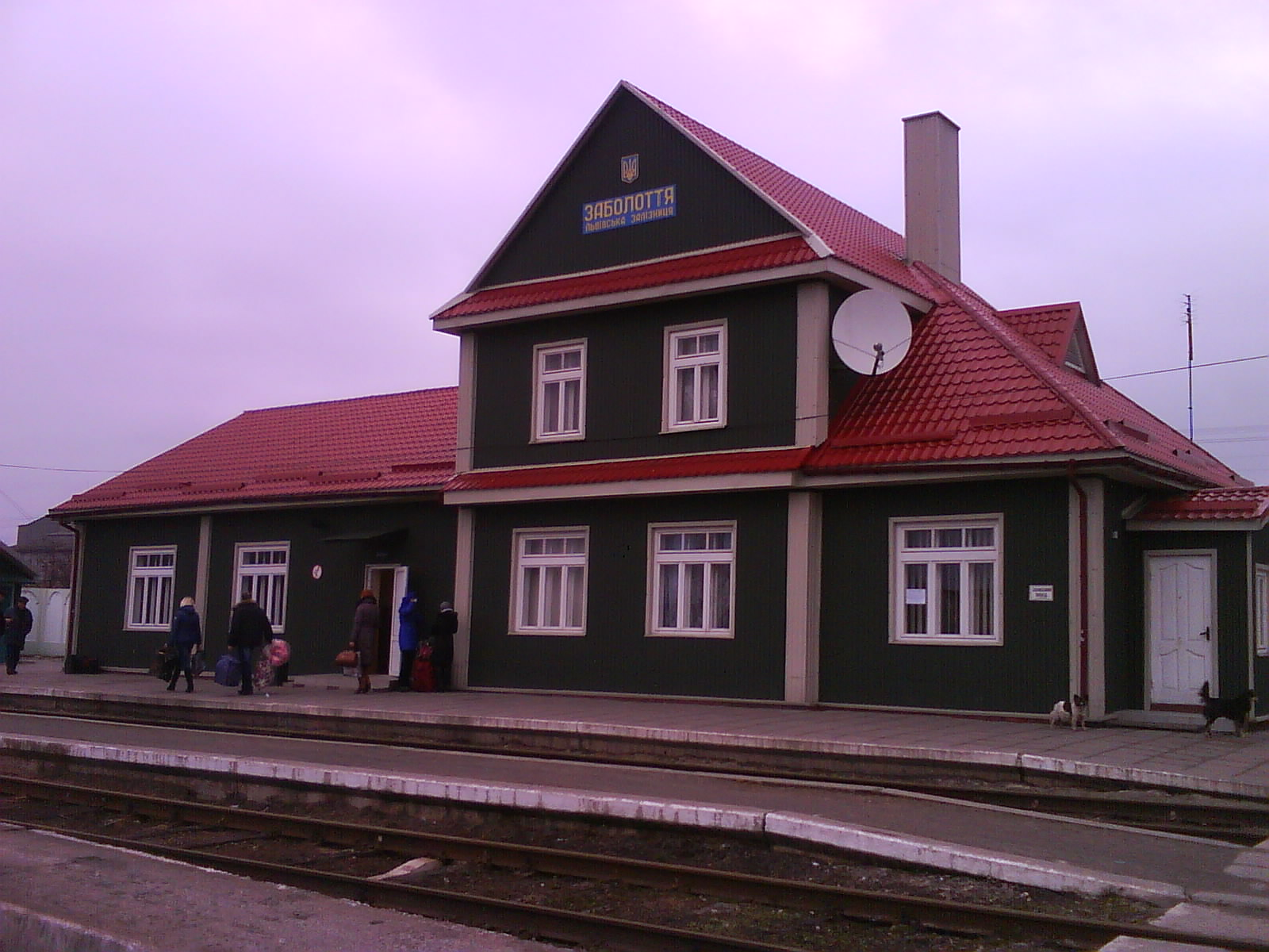 Заболотье. Вокзал.